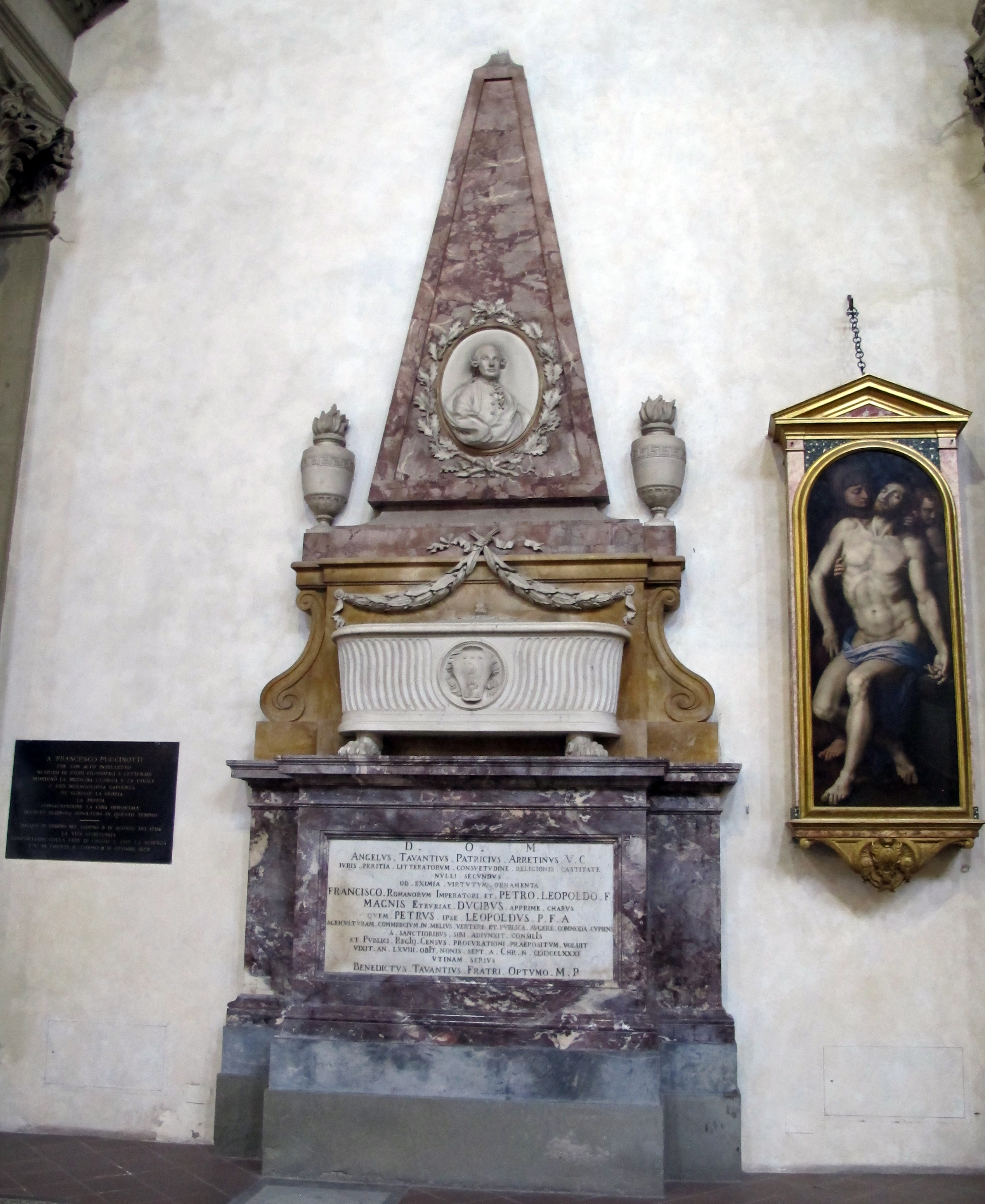 Santa croce, tomba di angelo tavanti (tavanzio)